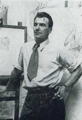 Karel Minář (1901-1973), český malíř, grafik, ilustrátor, sochař a profesor AVU v Praze